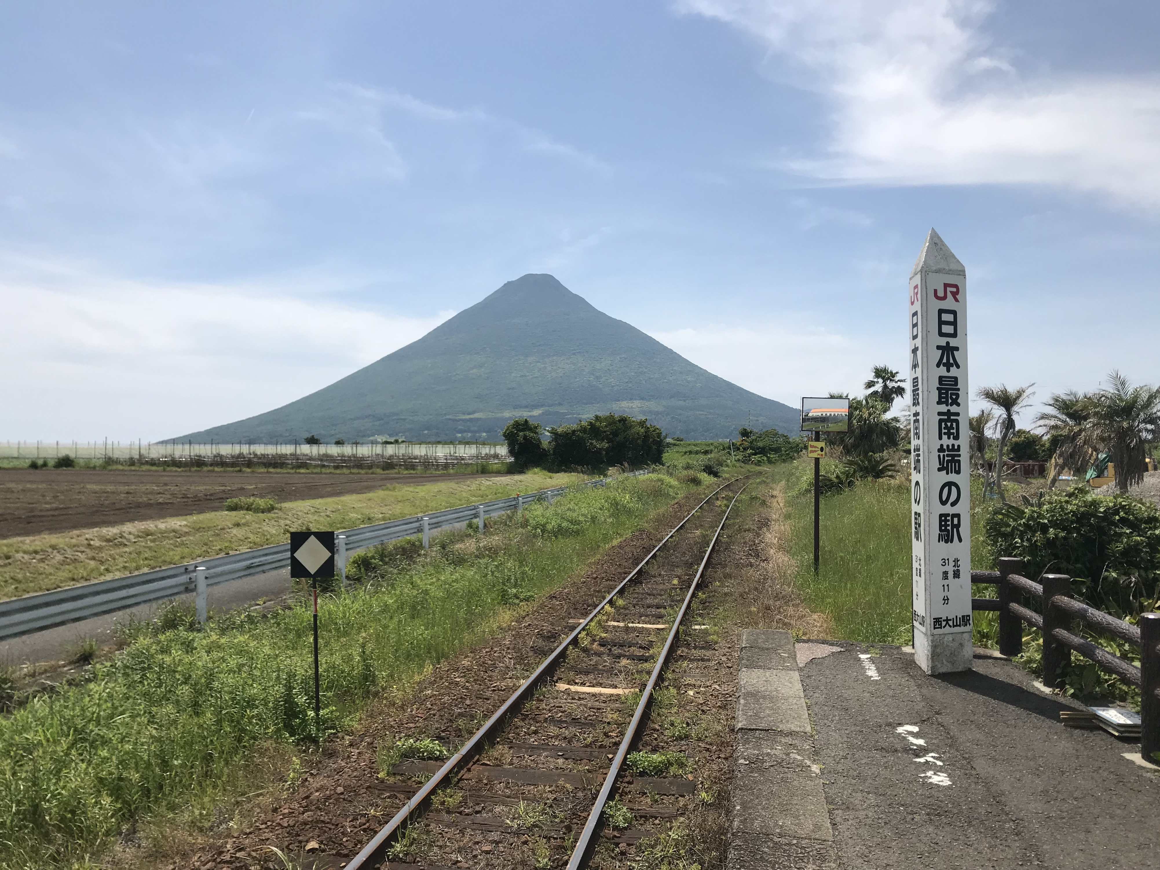 西大山駅のホームより望む開聞岳(奥は薩摩川尻方面)